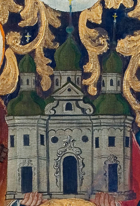 Беларуская (тарашкевіца): Слуцак (Słucak), Трайчаны (Trajčany). Царква Сьвятой Тройцы. Фрагмэнт абраза